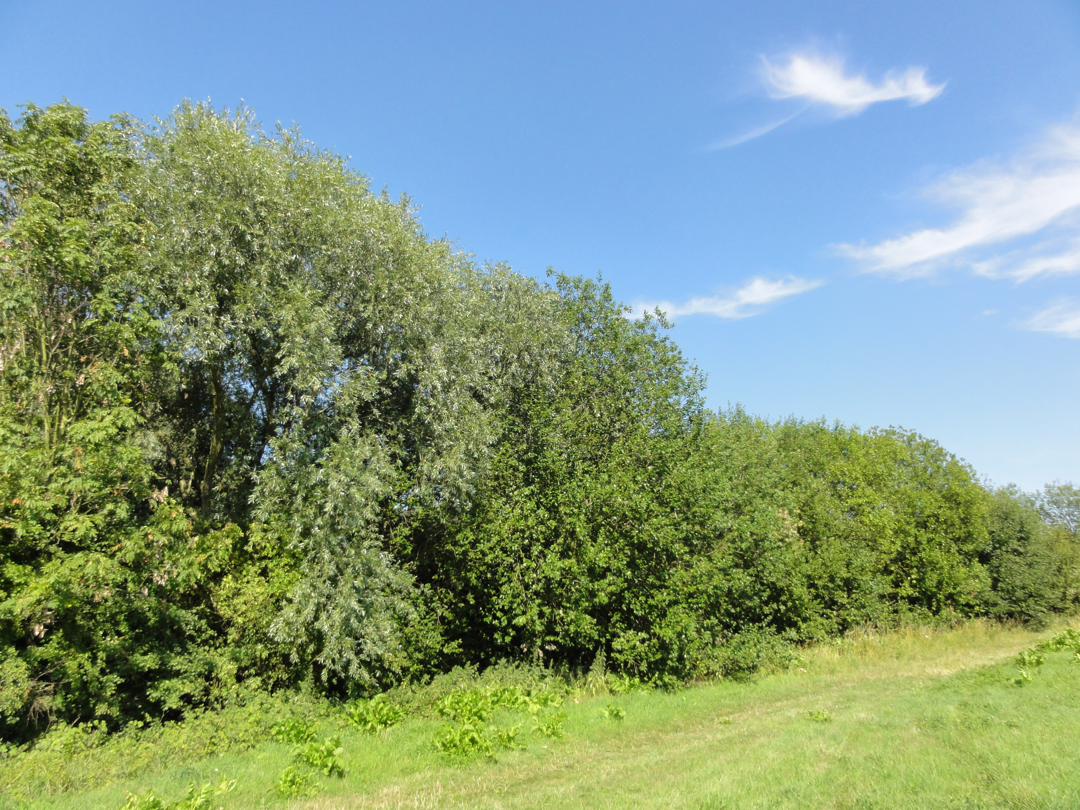 Terril n° 165 dit Blignières Ouest, Fosse Blignières de la Compagnie des mines d'Anzin, Rouvignies, Nord, Nord-Pas-de-Calais, France.